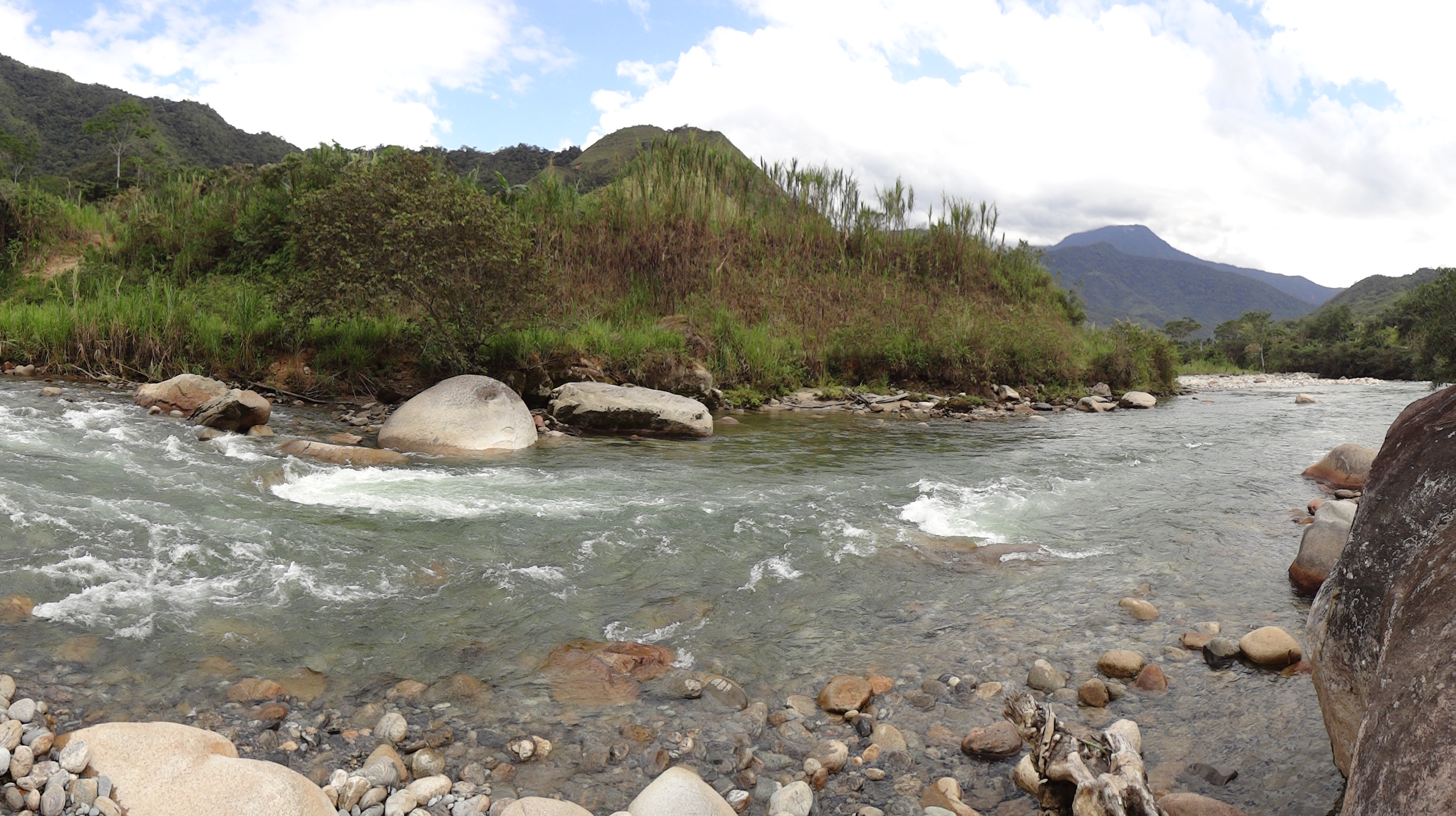 Las riberas del río Bombuscaro son un sitio ideal para disfrutar de su tranquilidad